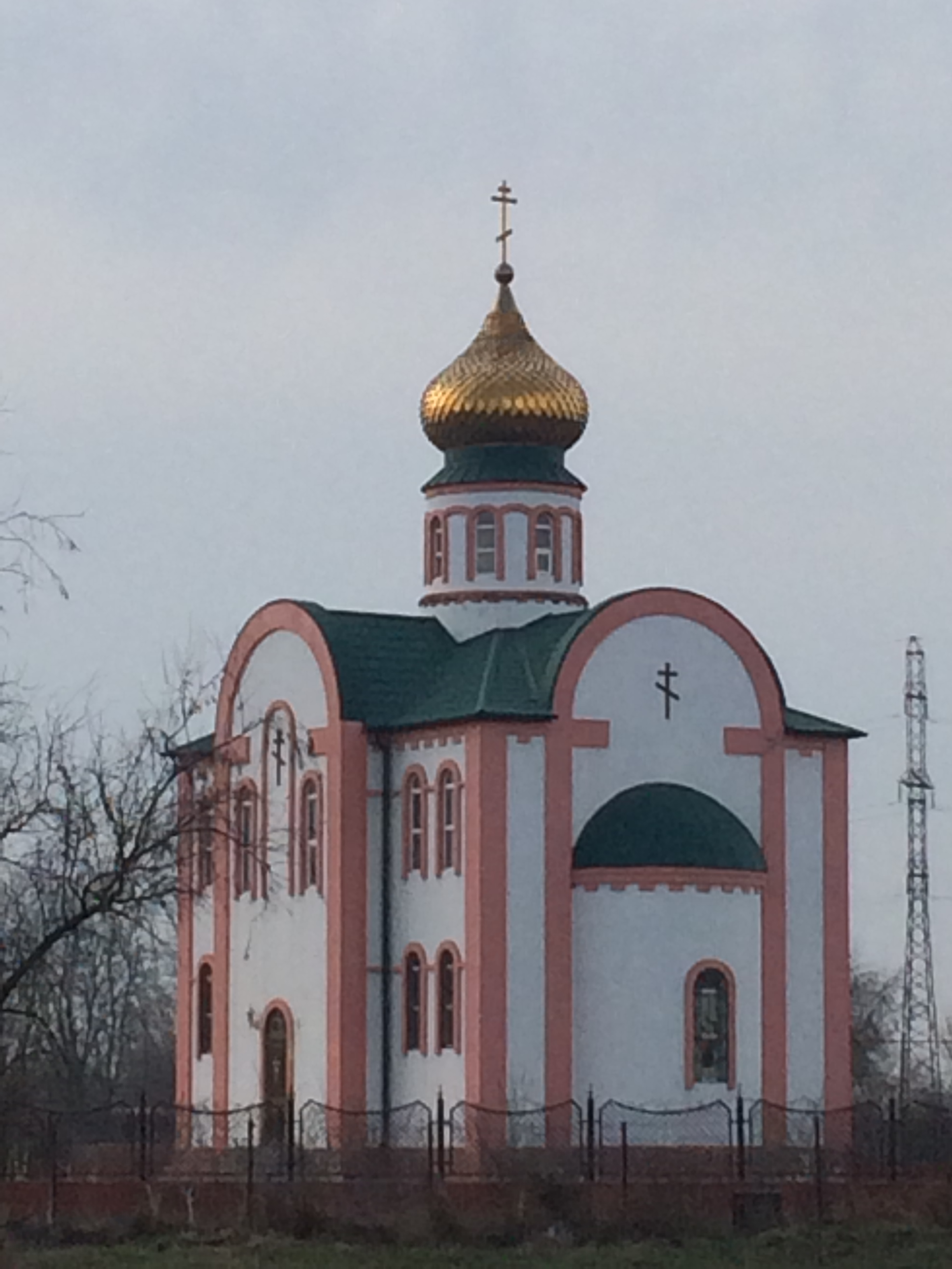 Крестовоздвиженский храм на территории русского кладбища в Кизляре